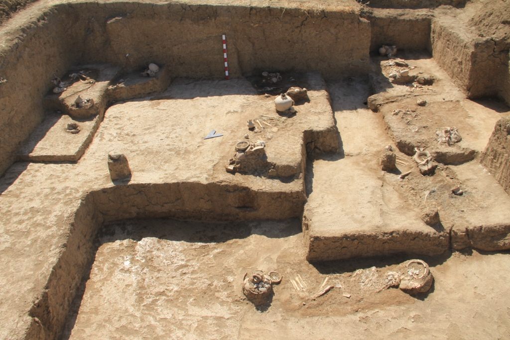 Foto Anar Həbibovundur.